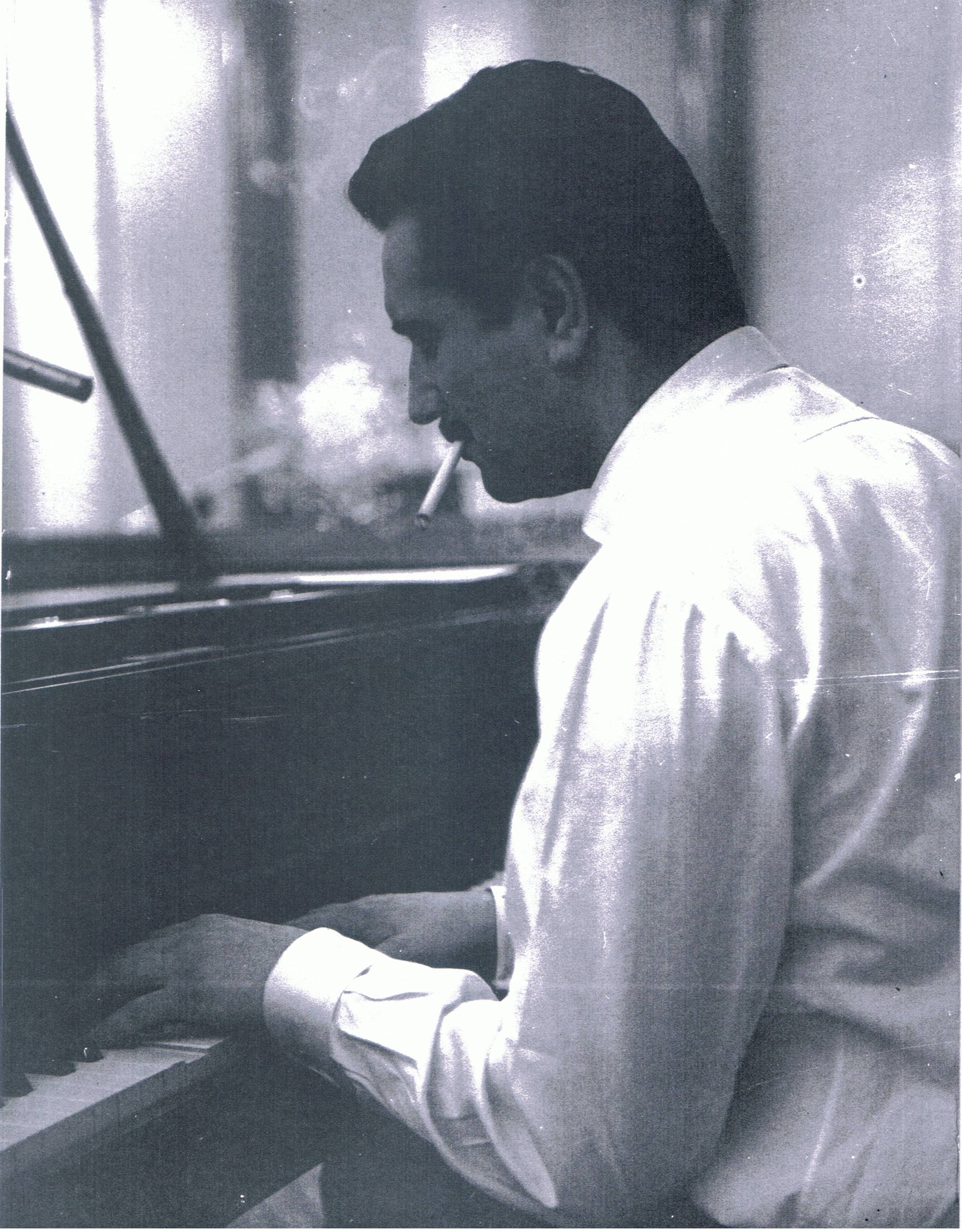 Gian Franco Reverberi al piano